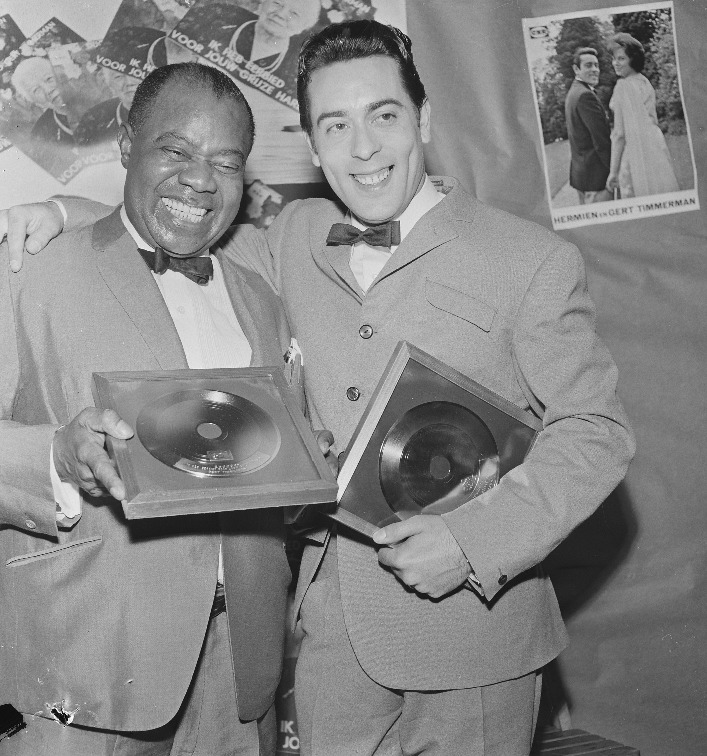 Collectie / Archief : Fotocollectie Anefo Reportage / Serie : [ onbekend ] Beschrijving : Gert Timmerman ontvangt gouden en diamanten plaat, hier met Louis Armstrong te Blokker Datum : 27 mei 1965 Locatie : Blokker Trefwoorden : ontvangsten Persoonsnaam : Armstrong, Louis, Gert Timmerman Fotograaf : Voets, Jan / Anefo Auteursrechthebbende : Nationaal Archief Materiaalsoort : Negatief (zwart/wit) Nummer archiefinventaris : bekijk toegang 2.24.01.03 Bestanddeelnummer : 917-8176